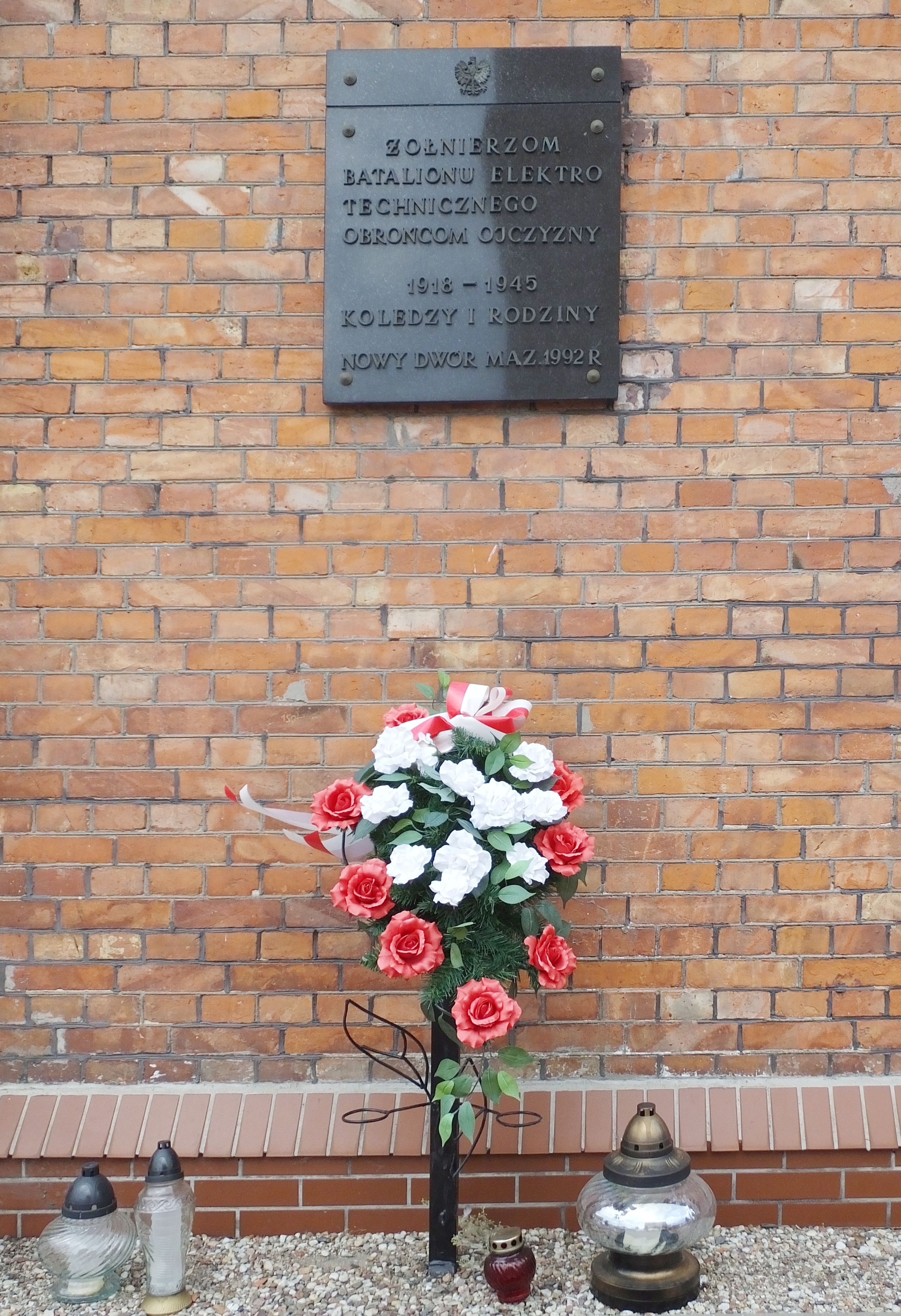 Tablica "Żołnierzom Batalionu Elektrotechnicznego, obrońcom ojczyzny, 1918–1945, koledzy i rodziny, Nowy Dwór Maz. 1992 r" umieszczona na budynku prokuratury w Nowym Dworze Mazowieckim